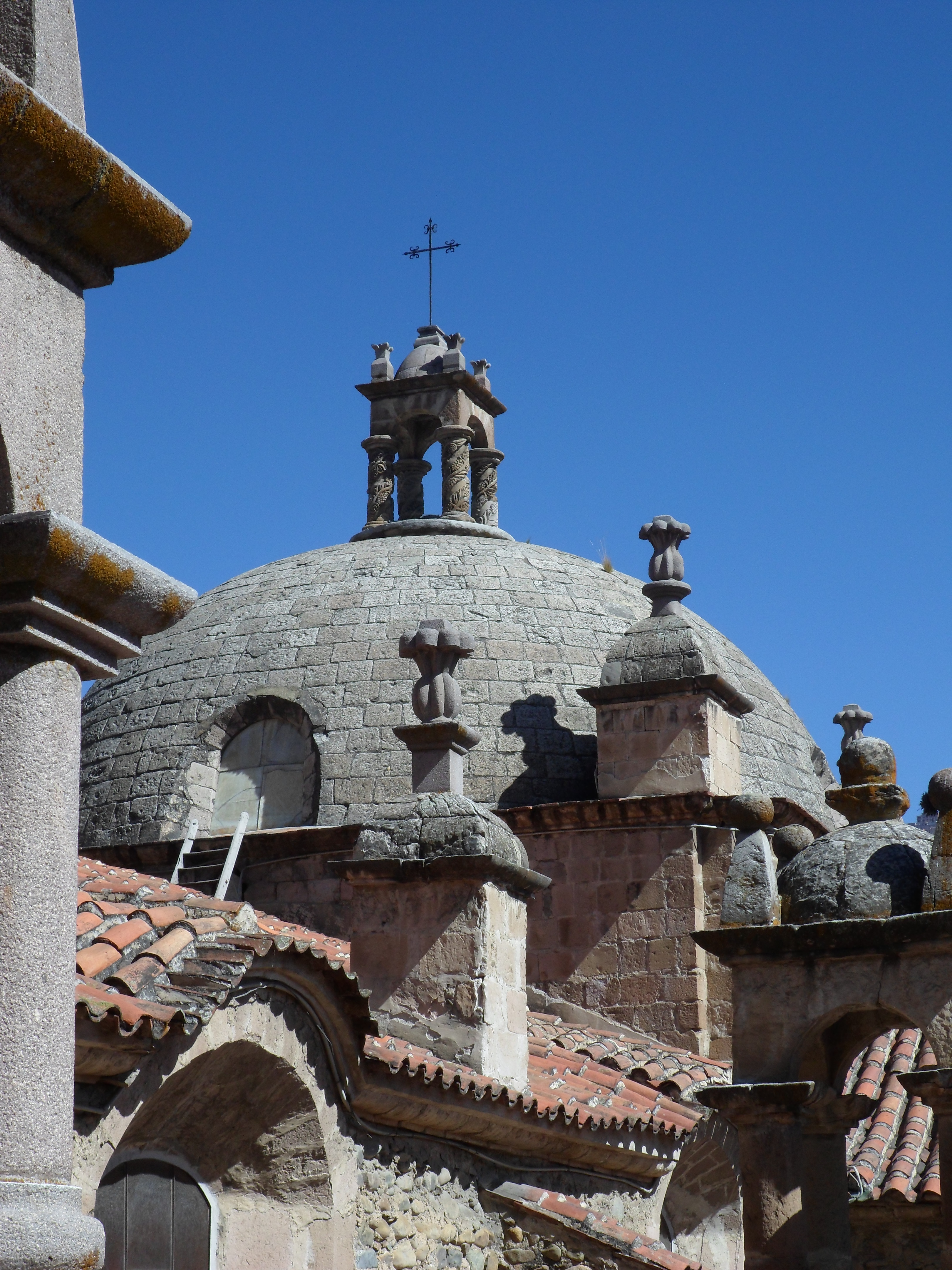 Bóveda Nave Central, Basílica de San Francisco. La Paz, Bolivia